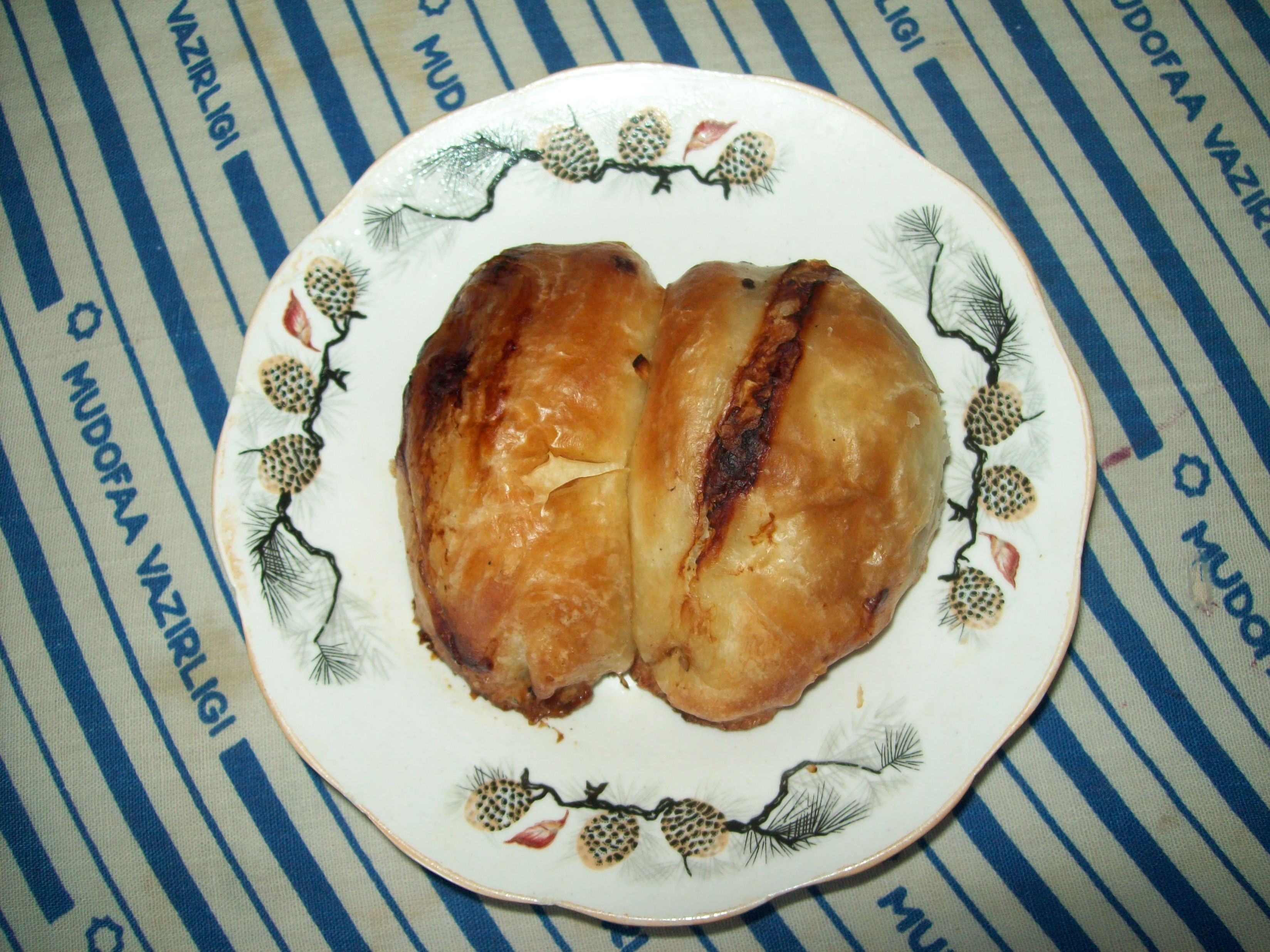 Пармуда - узбекский самса.